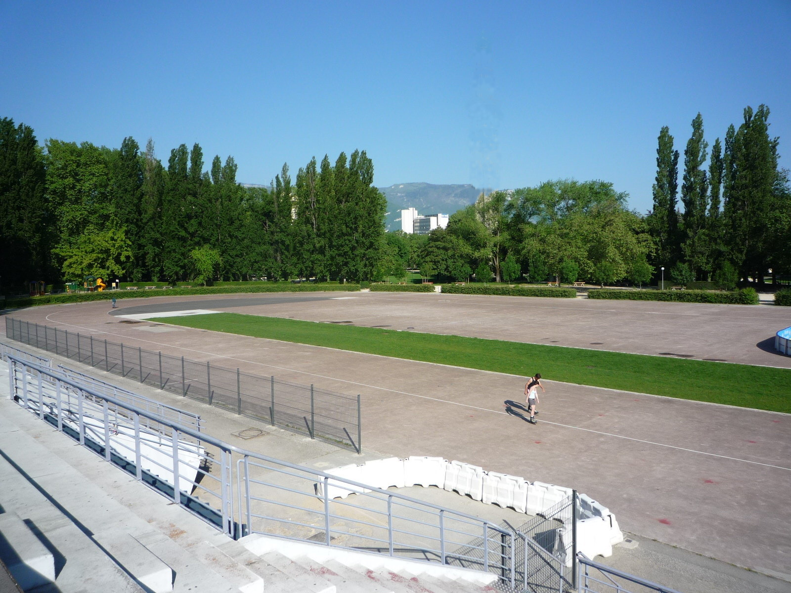 Anneau de vitesse - Grenoble. La tour Perret a été supprimée du paysage car sinon on se fait supprimer la photo sur commons !